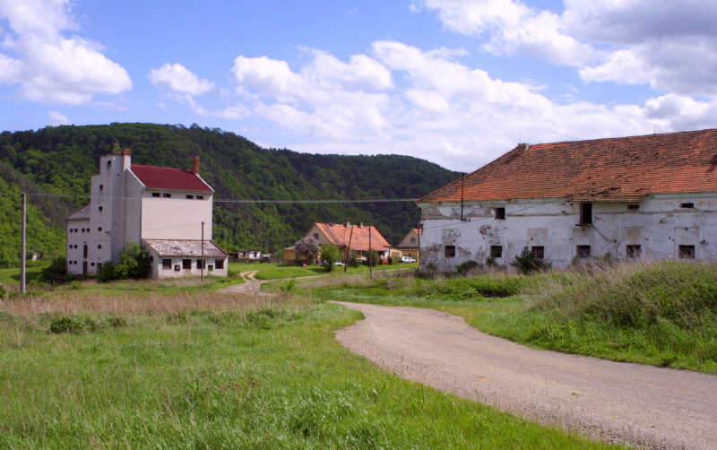 Hospodářský dvůr a osada Ptyč.